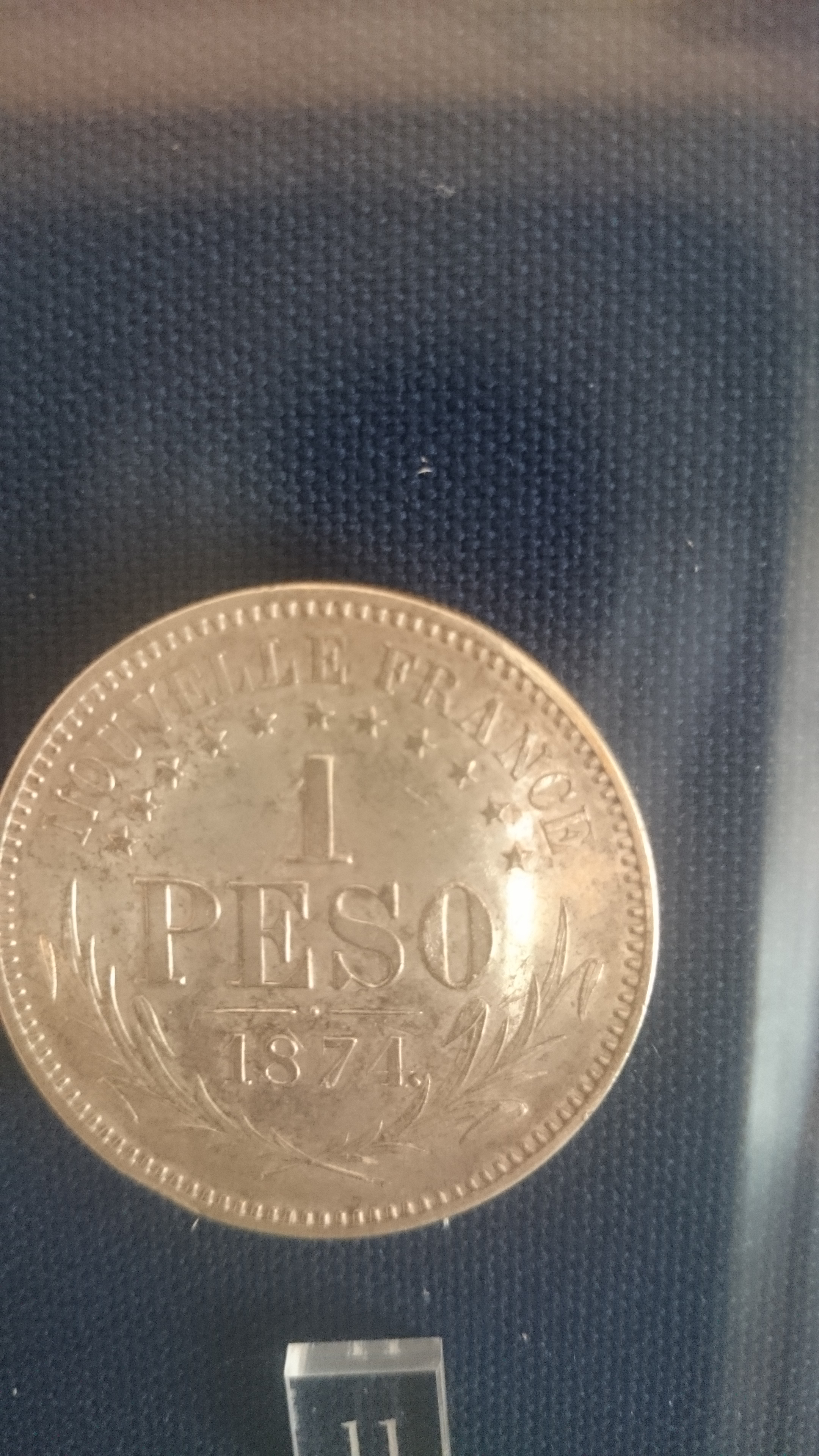 Monnaie du royaume recto, Museo Historico y Numismatico, Buenos Aires